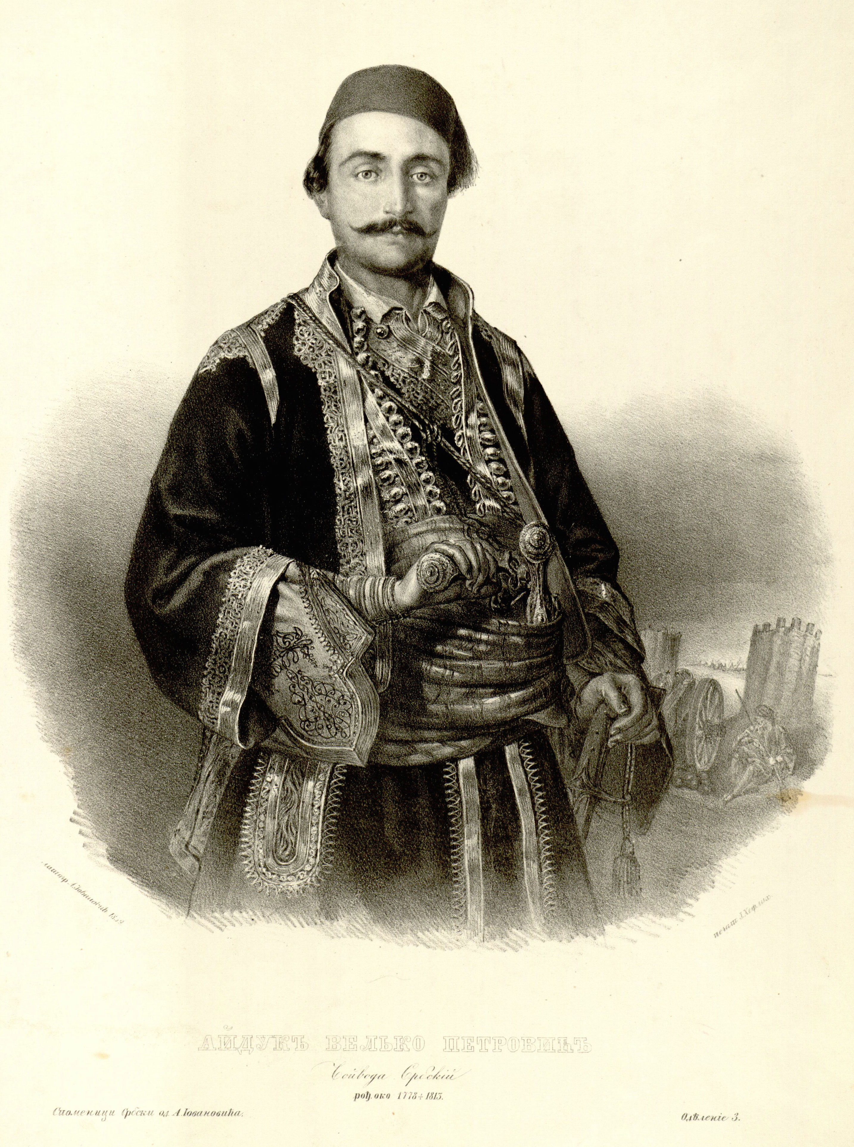 Lithograph of Hajduk Veljko Petrović by Anastas Jovanović. Caption: литогр. А. Іовановић 1852печат Ј. Хефлих. АЙДУКЪ ВЕЛЬКО ПЕТРОВИЋЪ Войвода Србскій рођ. око 1778+1813. Споменици Србски од А. Іовановића.Одѣленіе 3.